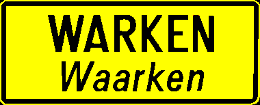 Zweisprachiges Ortseingangsschild (Amtlich Französisch und kurSiv in Luxemburgisch) der luxemburgischen Gemeinde Warken.